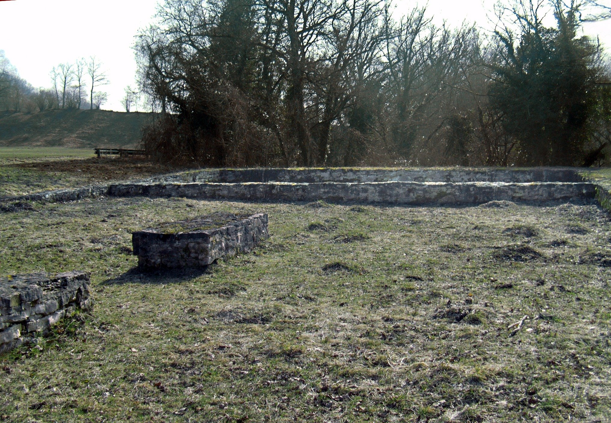 Das wissenschaftlich umstrittene spätantike Kleinkastell Weltenburg-Frauenberg befindet sich auf dem Arzberg, oberhalb des Kloster Weltenburg